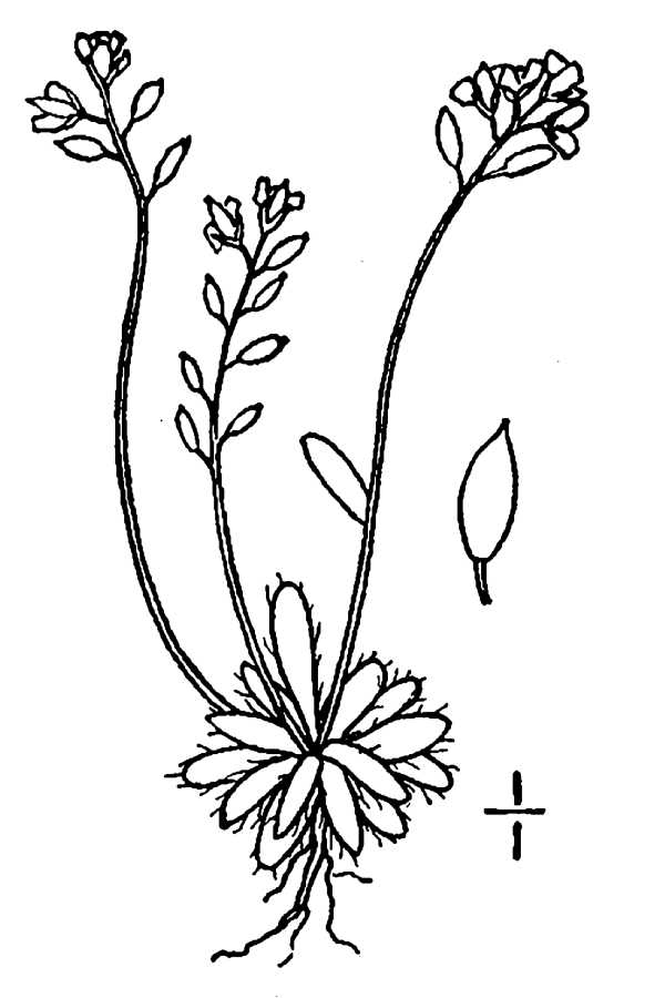 Draba fladnizensis Wulfen - Austrian draba